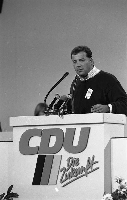 7./8.10.1986 34. Bundesparteitag der CDU in der Rheingoldhalle, Mainz (6.-8.10.1986)